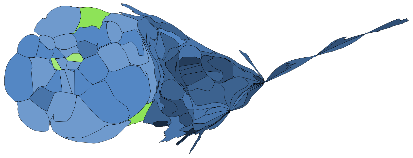 顏色對照表